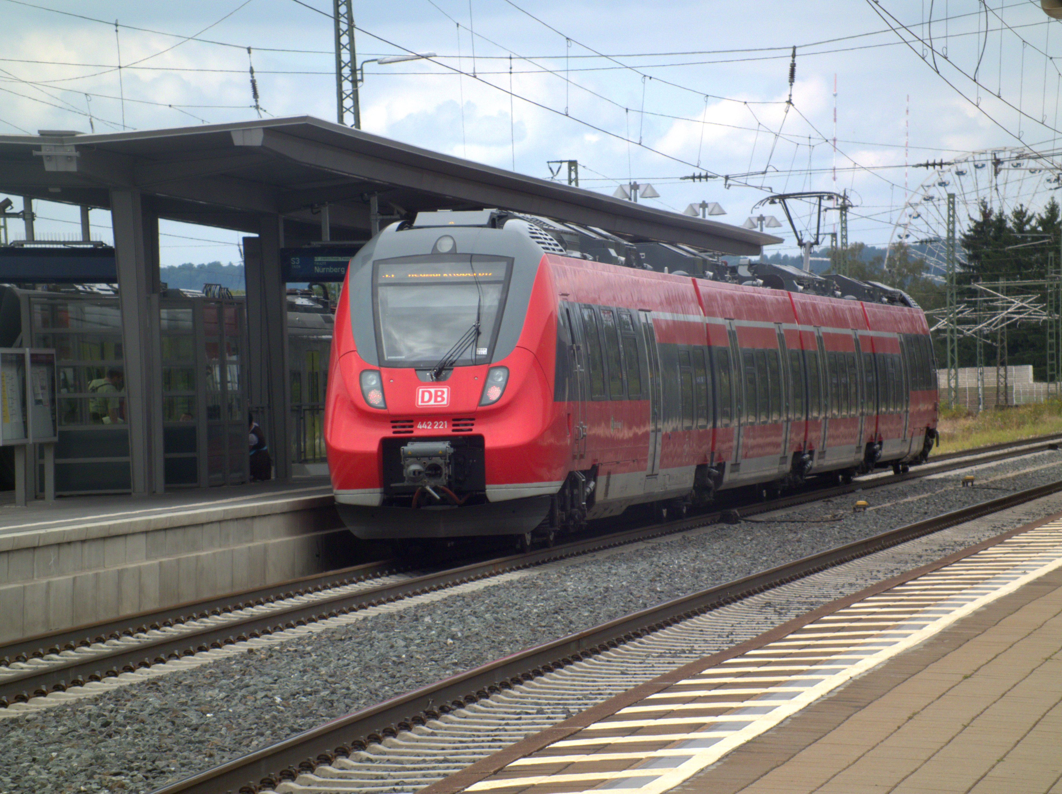 Bomardier Talent 2 - S-Bahn Nürnberg im Bahnhof Neumarkt